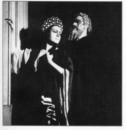 André Pernet et Marisa Ferrer en Œdipe et Jocaste dans la première d'Œdipe d'Enesco (Palais Garnier, 1936)